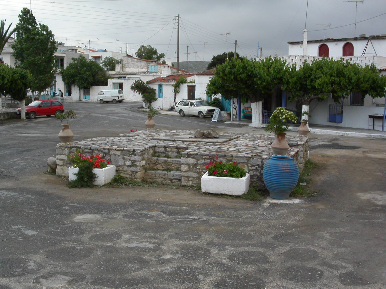 Smaricentre